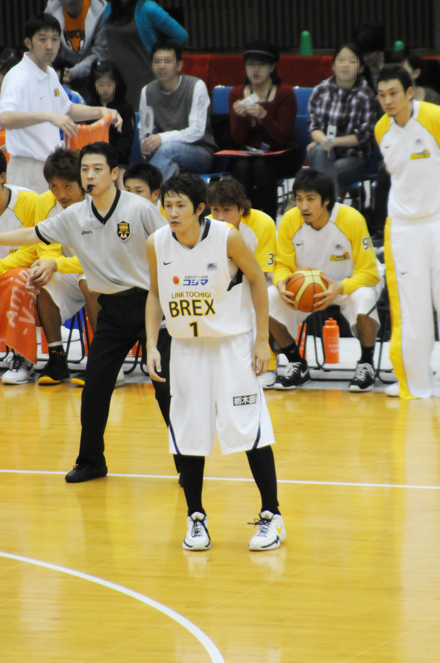 リンク栃木ブレックスの川村卓也選手。とどろきアリーナで。